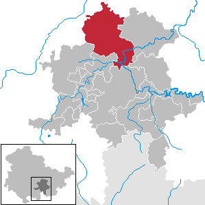 Rudolstadt in Thuringia - District Saalfeld-Rudolstadt